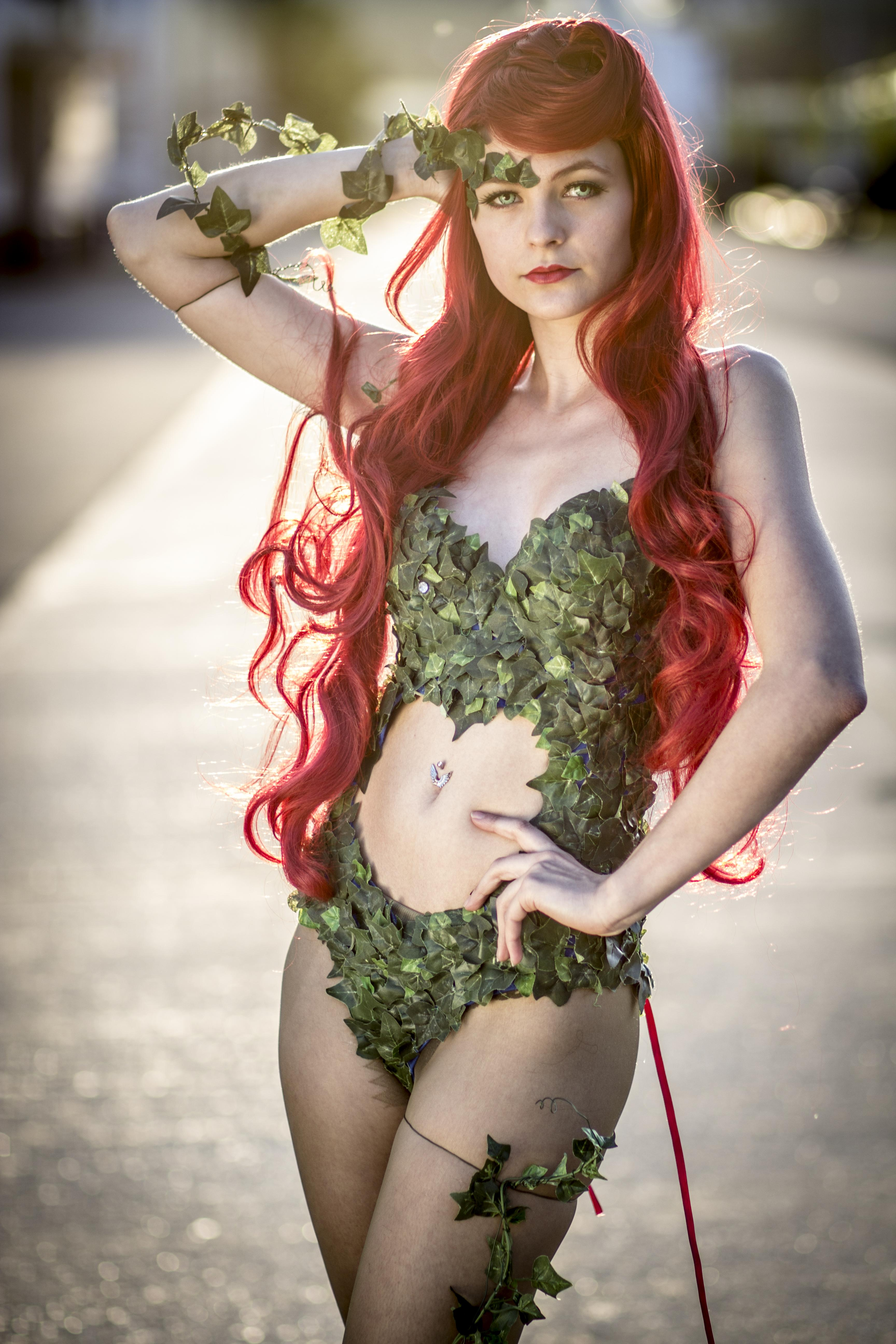 Poison Ivy